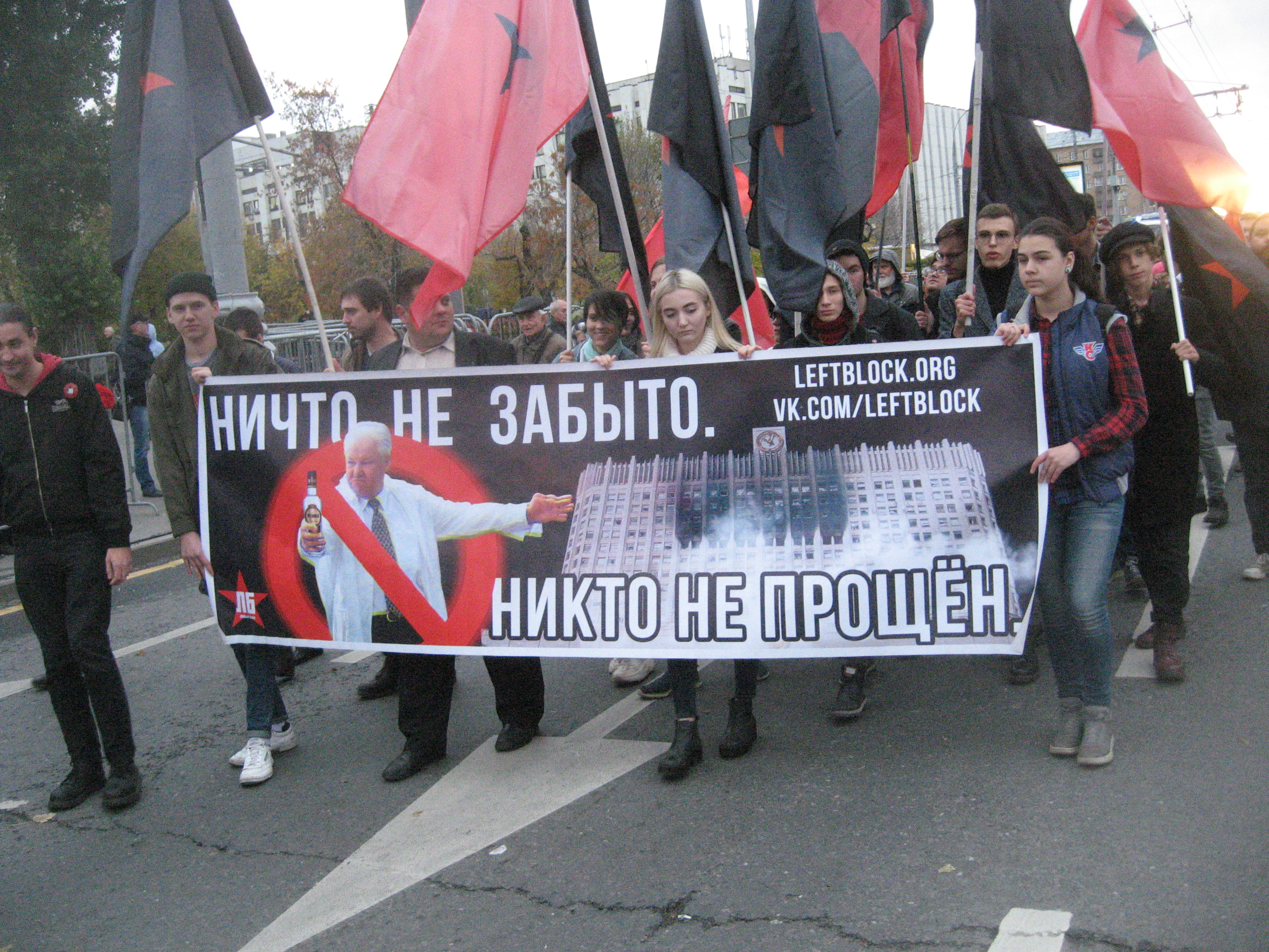 Митинг памяти погибших в октябре 1993 г, проводился в Москве 4 октября 2019 г.